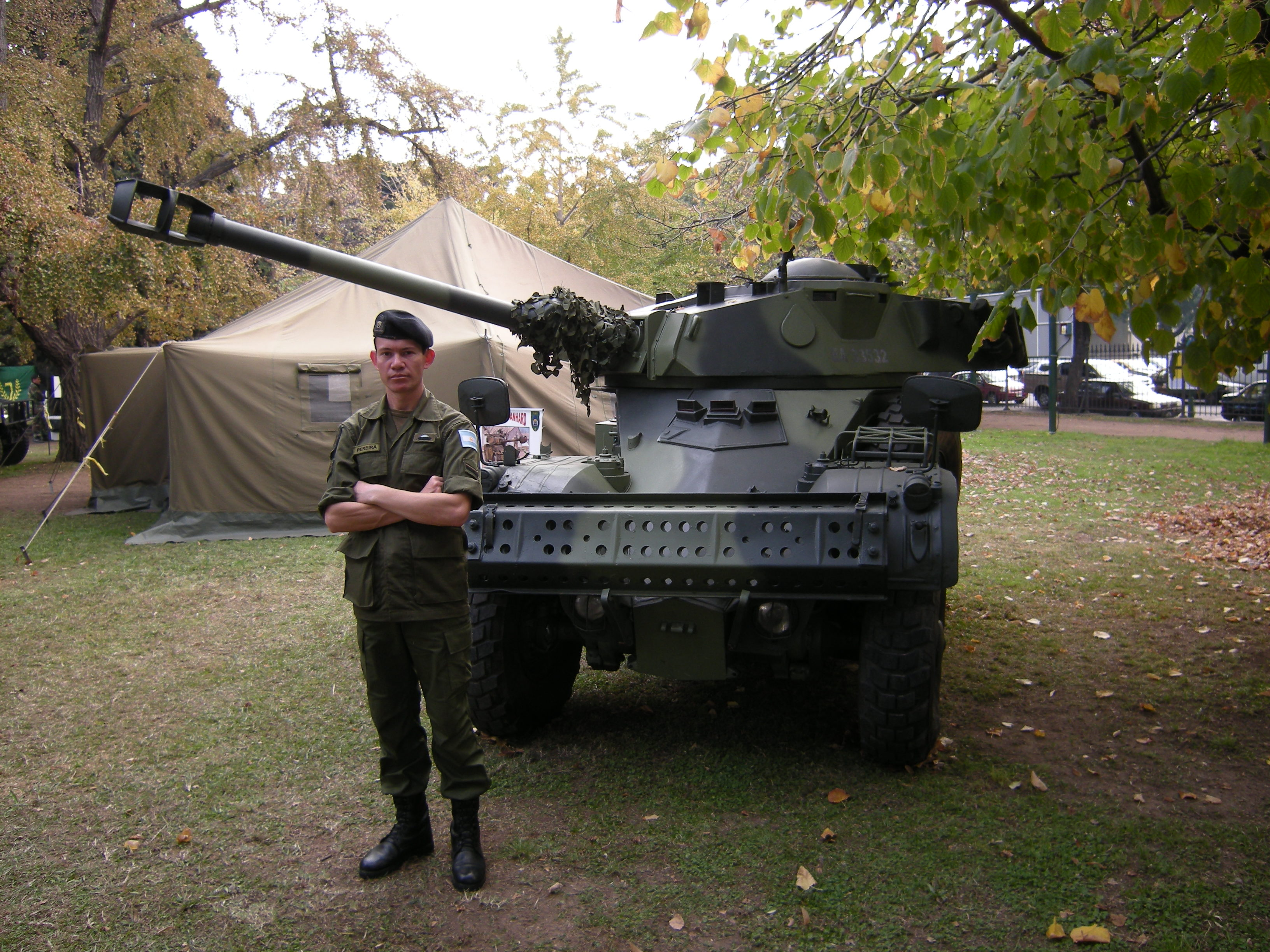 Panhard AML 90, durante la Exposición del Ejército Argentino realizada en mayo de 2008